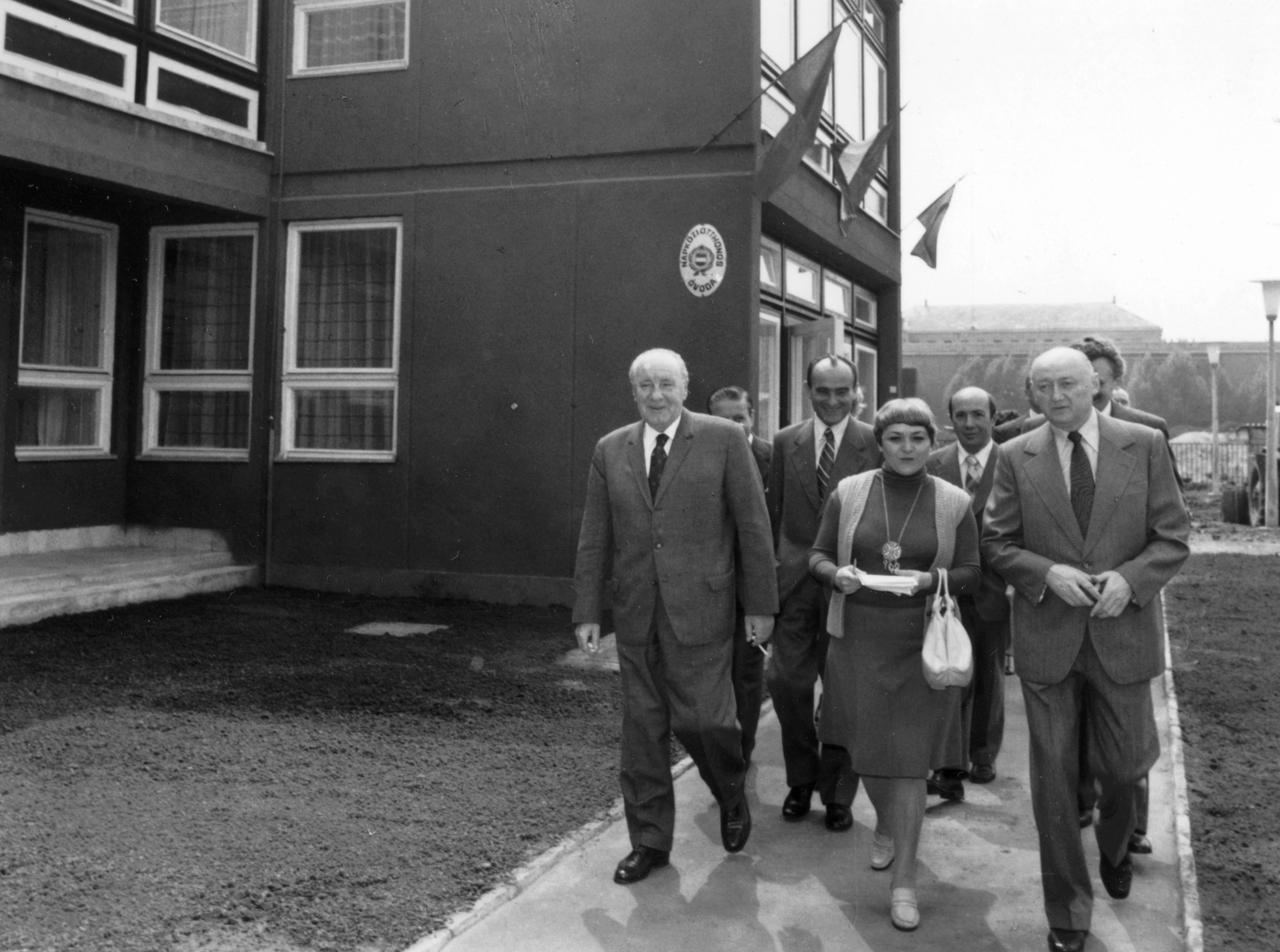 Budapest, XIII. Kárpát utca 25-27., Zöld Óvoda. Balra Kádár János, jobbra Biszku Béla.